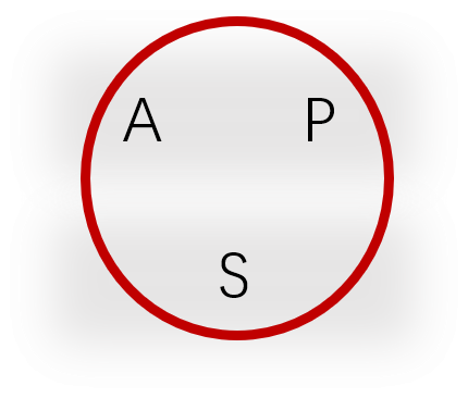 中文（中国大陆）: 句法形态配列，SAP